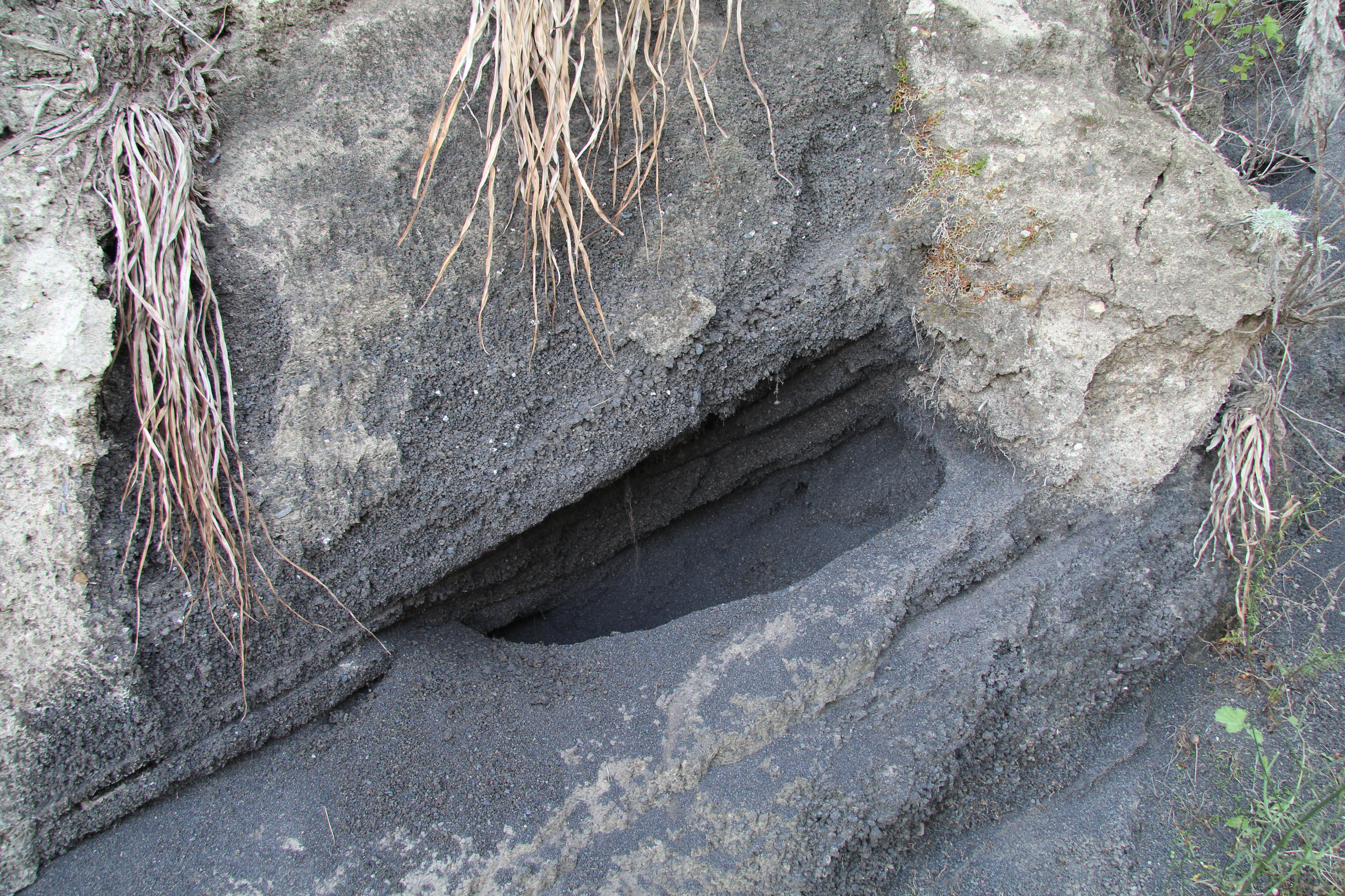 Lapilli im Norden Liparis